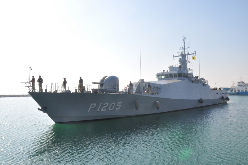 Tuzla Sınıfı Karakol Gemisi